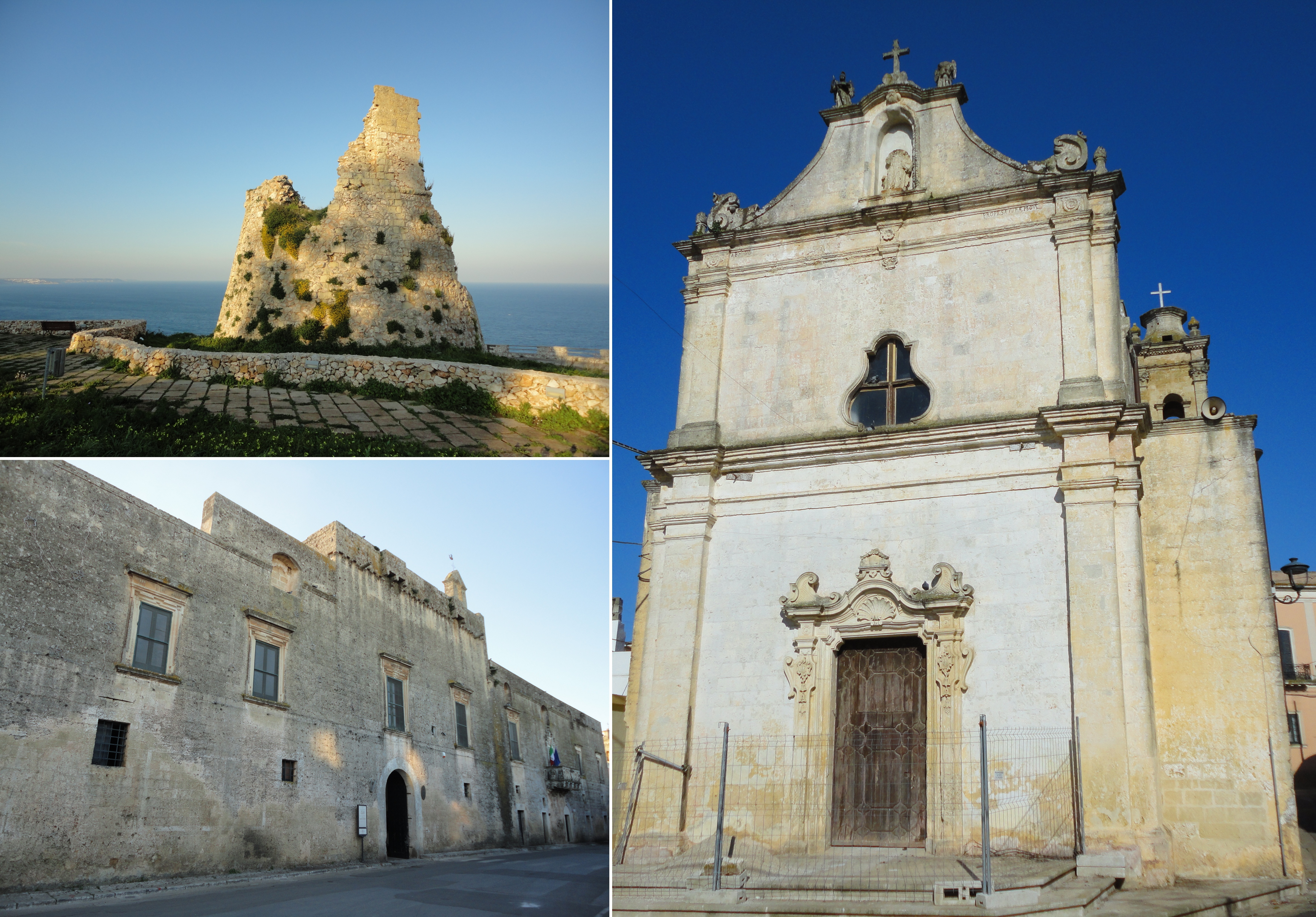 Collage Tiggiano. Realizzato a partire dalle seguenti immagini: File:Palazzo Baronale di Tiggiano.jpg File:Torre Nasparo Tiggiano.jpg File:Chiesa di Sant'Ippazio Tiggiano.jpg